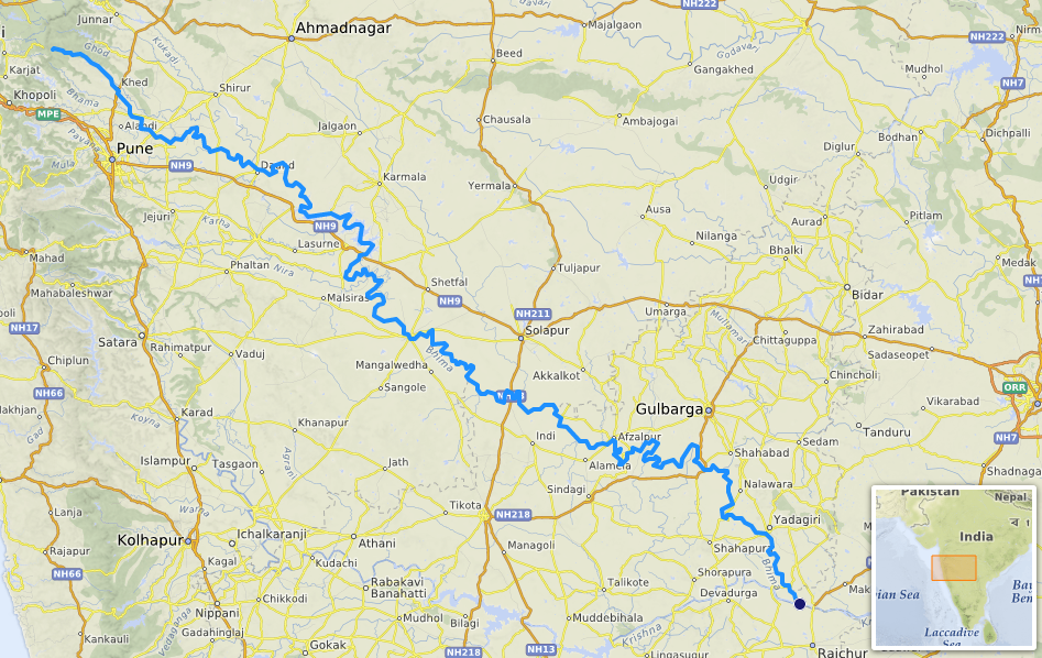 carte réalisée sur umap [1] This map may be incomplete, and may contain errors. Don't rely solely on it for navigation.